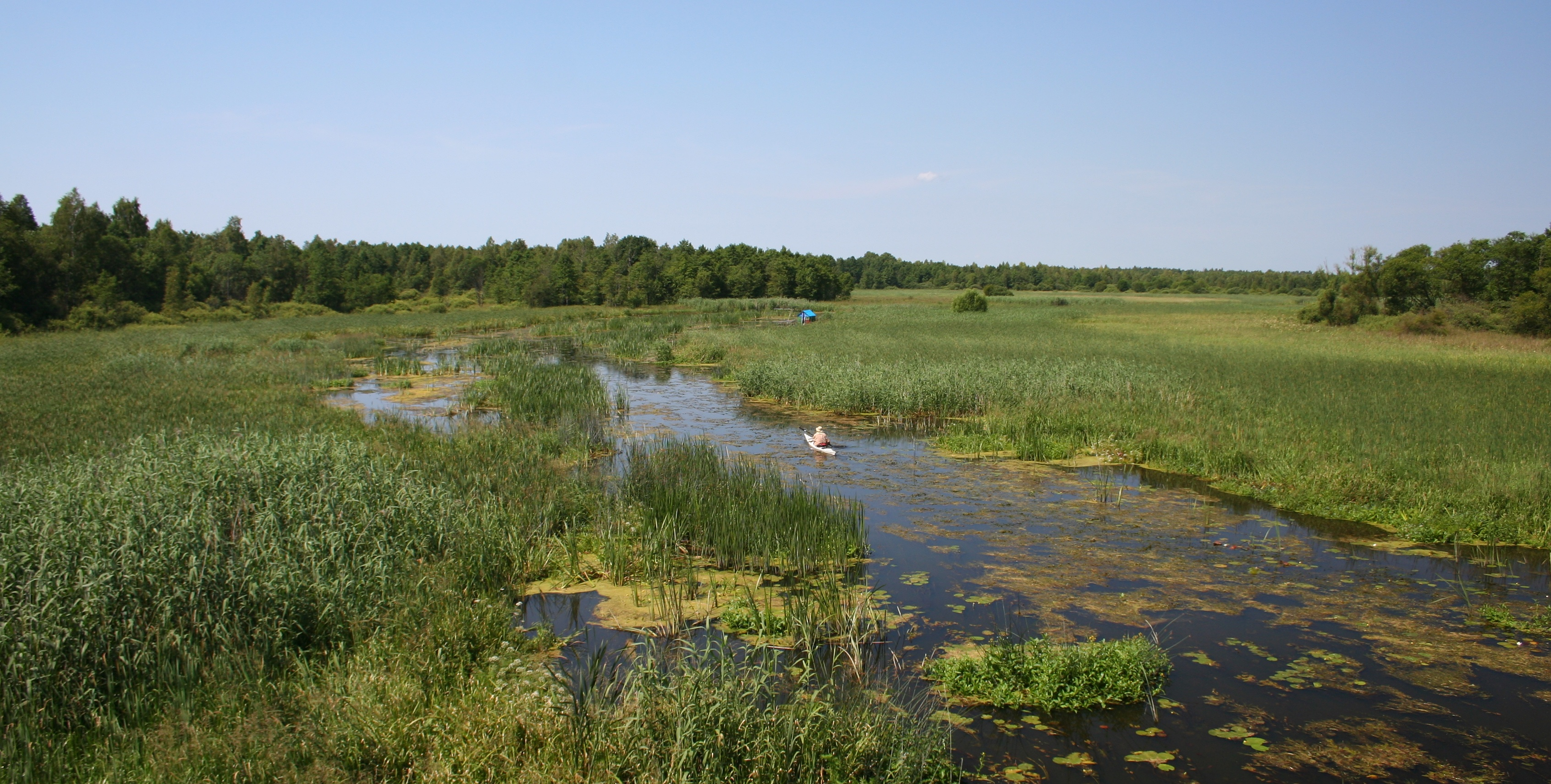 Biebrza przepływająca przy drodze do Lipska - widok z mostu. Na tym odcinku rzeki przebiega turystyczny szlak kajakowy.